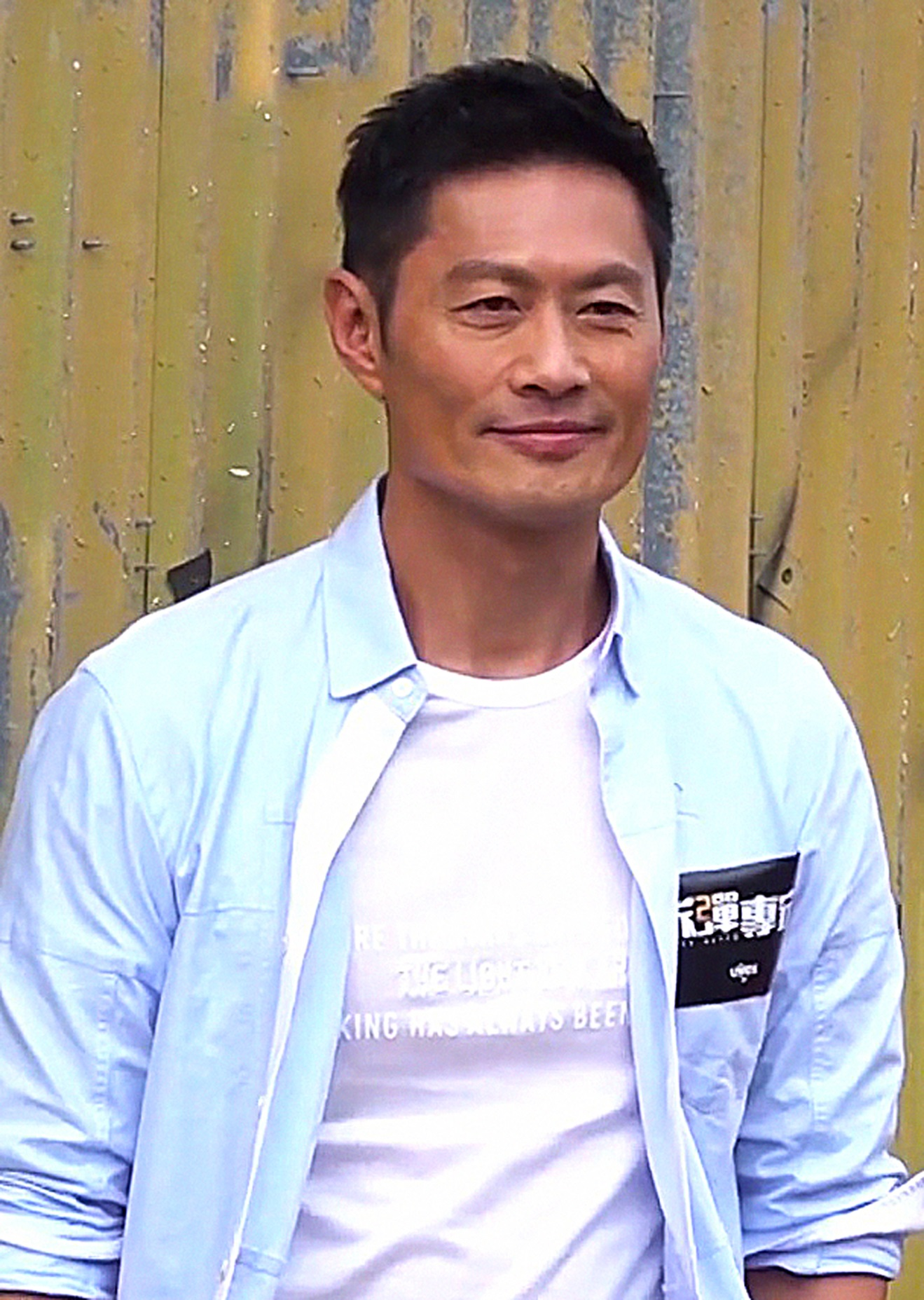 中文（香港）: 《拆彈專家2》開機儀式